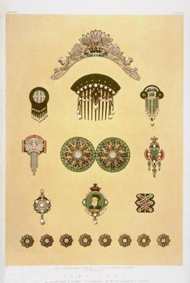 Juwelen von Garrard & Co und Hunt and Roskell.